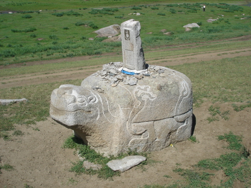 Statue de tortue (voir Bìxì - Sud de Karakorum (Mongolie)